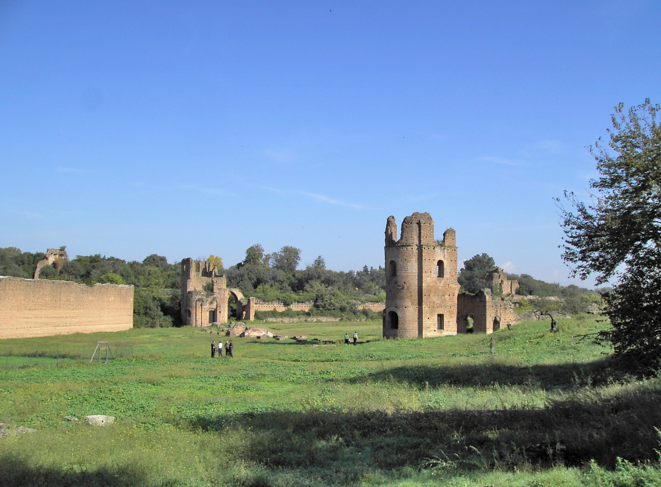 Roma, via Appia Antica - Circo di Massenzio, le torri by Lalupa